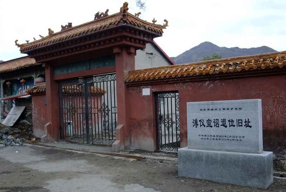 溥仪宣召退位旧址——溥仪宣诏退位纪念馆大门